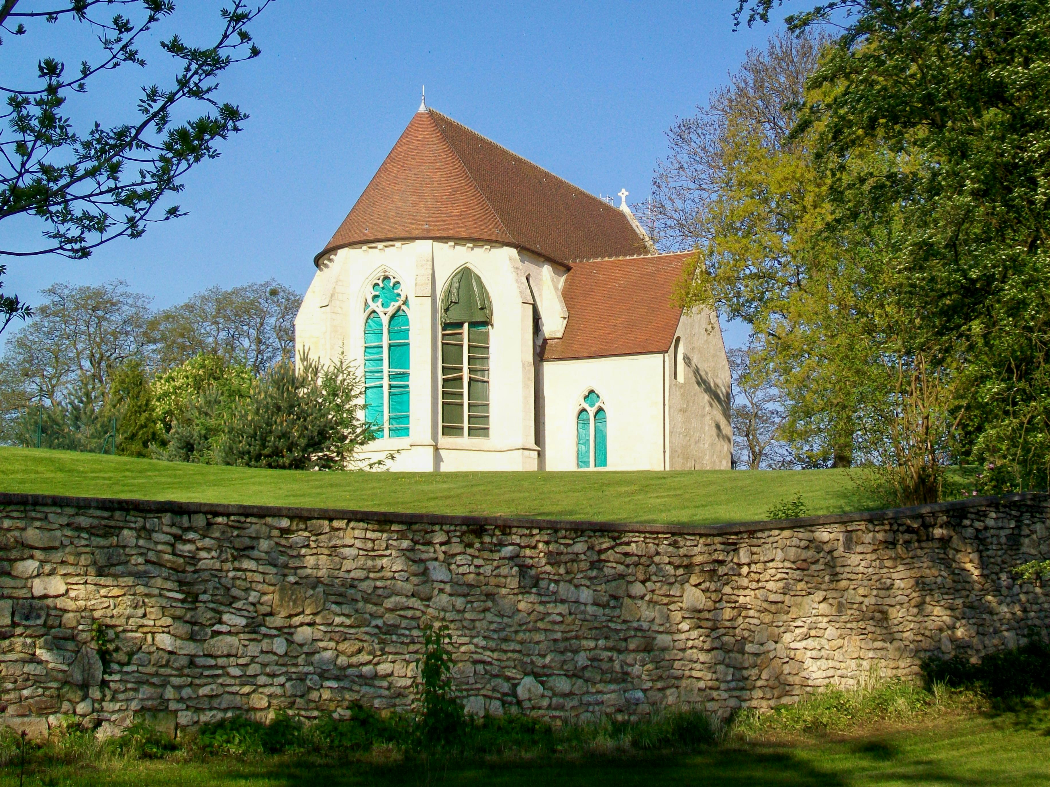 La chapelle du prieuré Saint-Victor, dont la toiture vient d'être complètement refaite et dont les murs sont en restauration : travaux réalisés grâce à l'engagement des propriétaires qui ont sauvé l'édifice menaçant ruine.